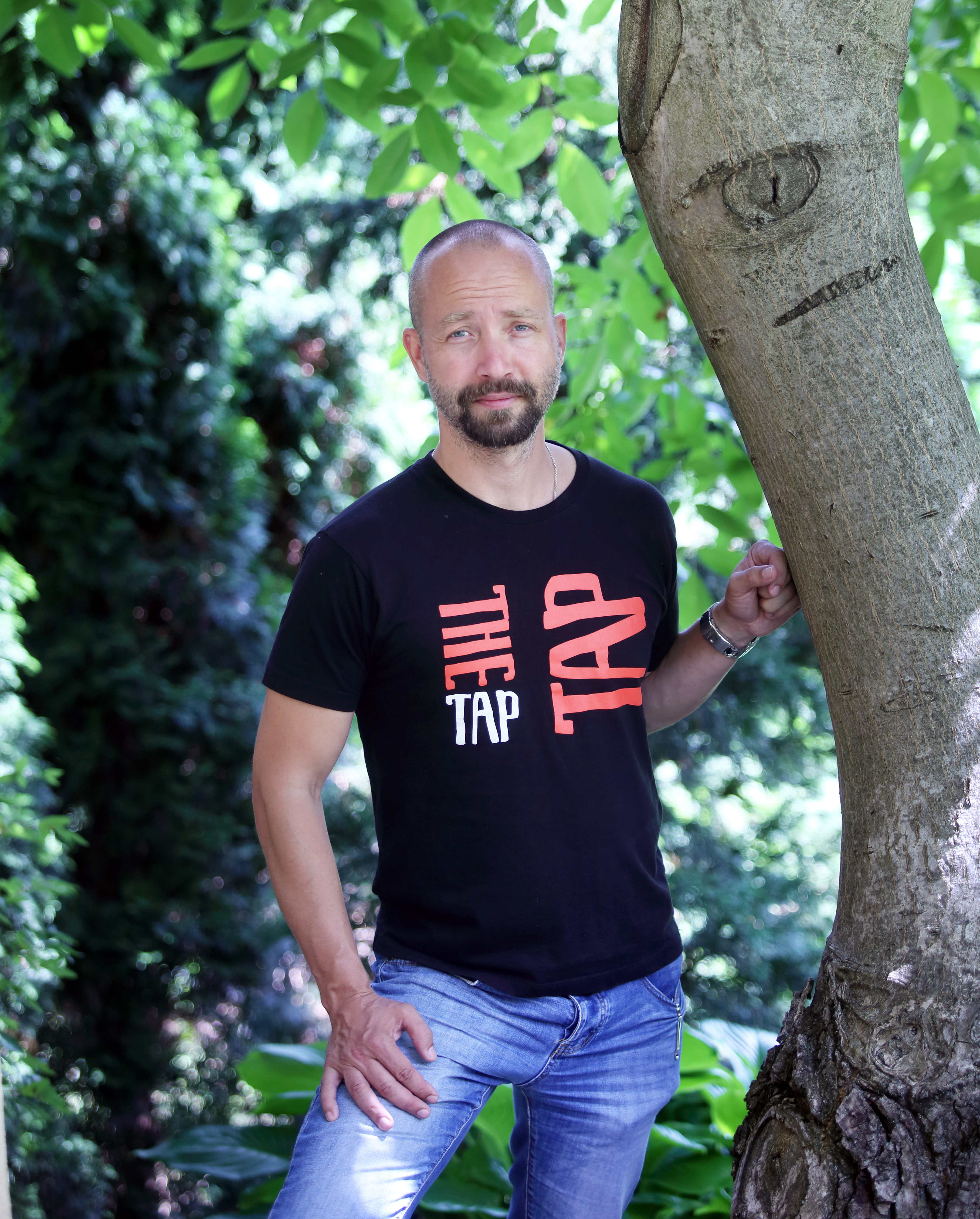 Šimon Ornest, český zpěvák, hudebník, pedagog, kapelník a manažer skupiny The Tap Tap